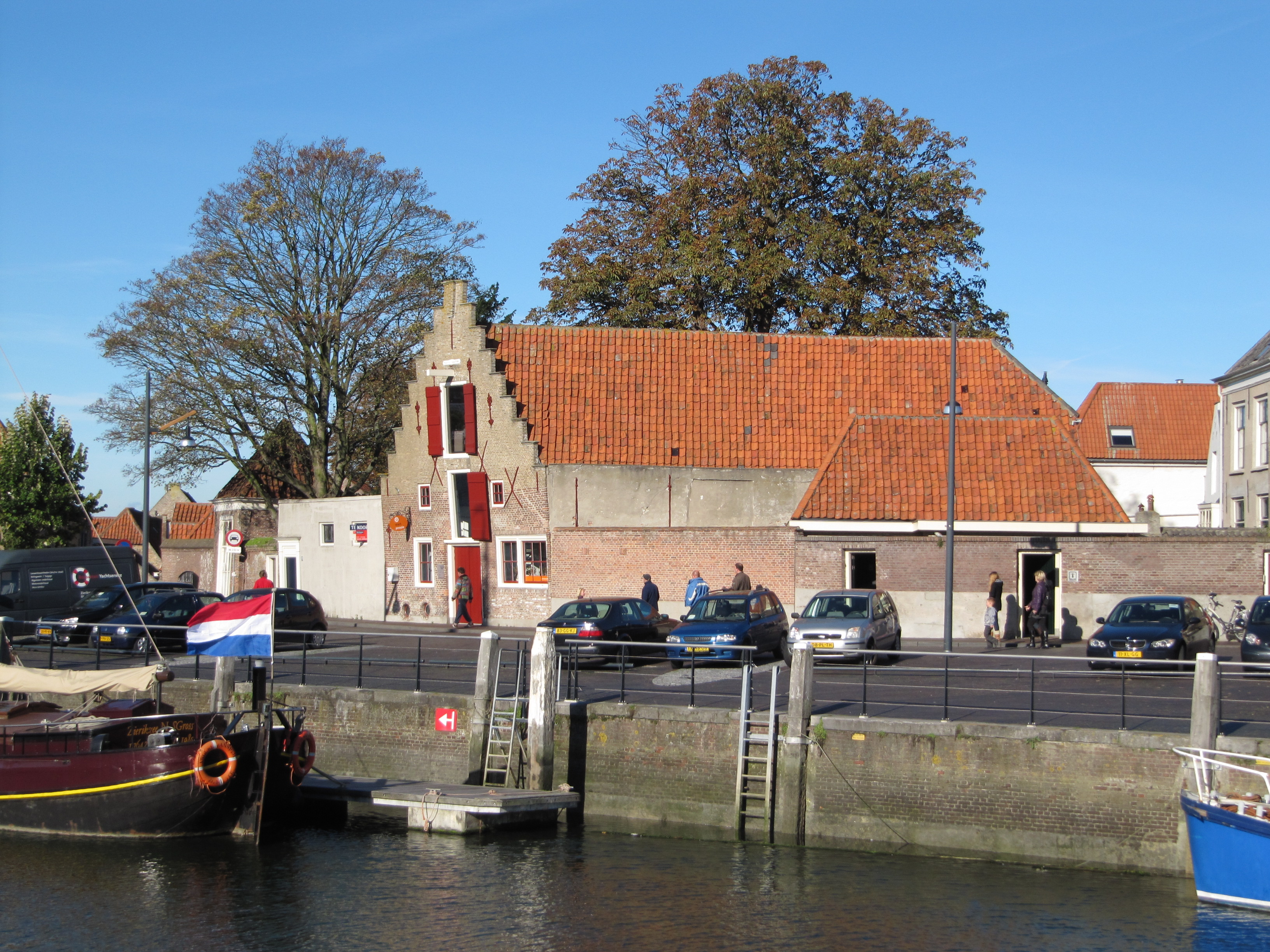 RM40847 Zierikzee - Nieuwe Haven 147 (foto 1).jpg